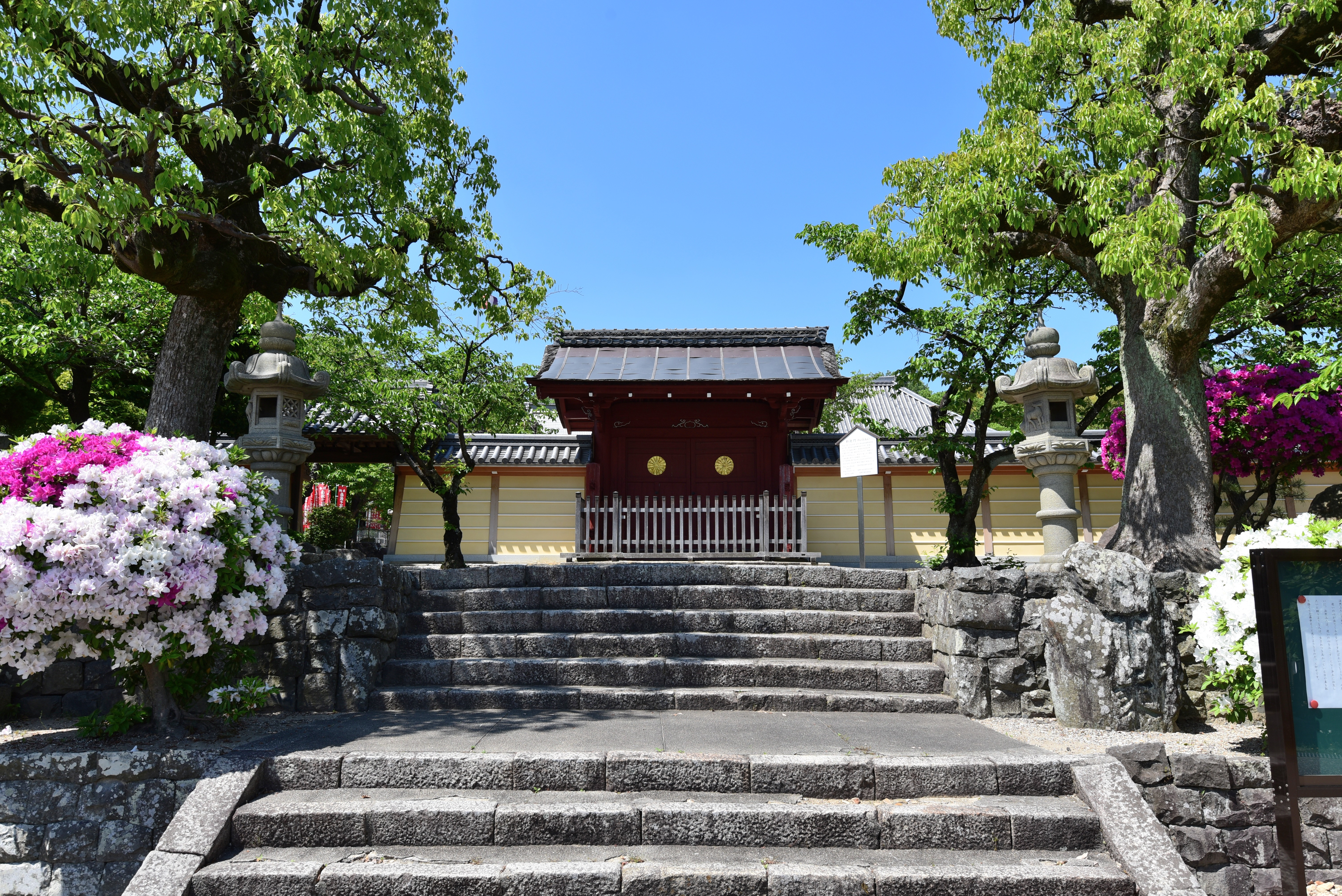 祐福寺勅使門